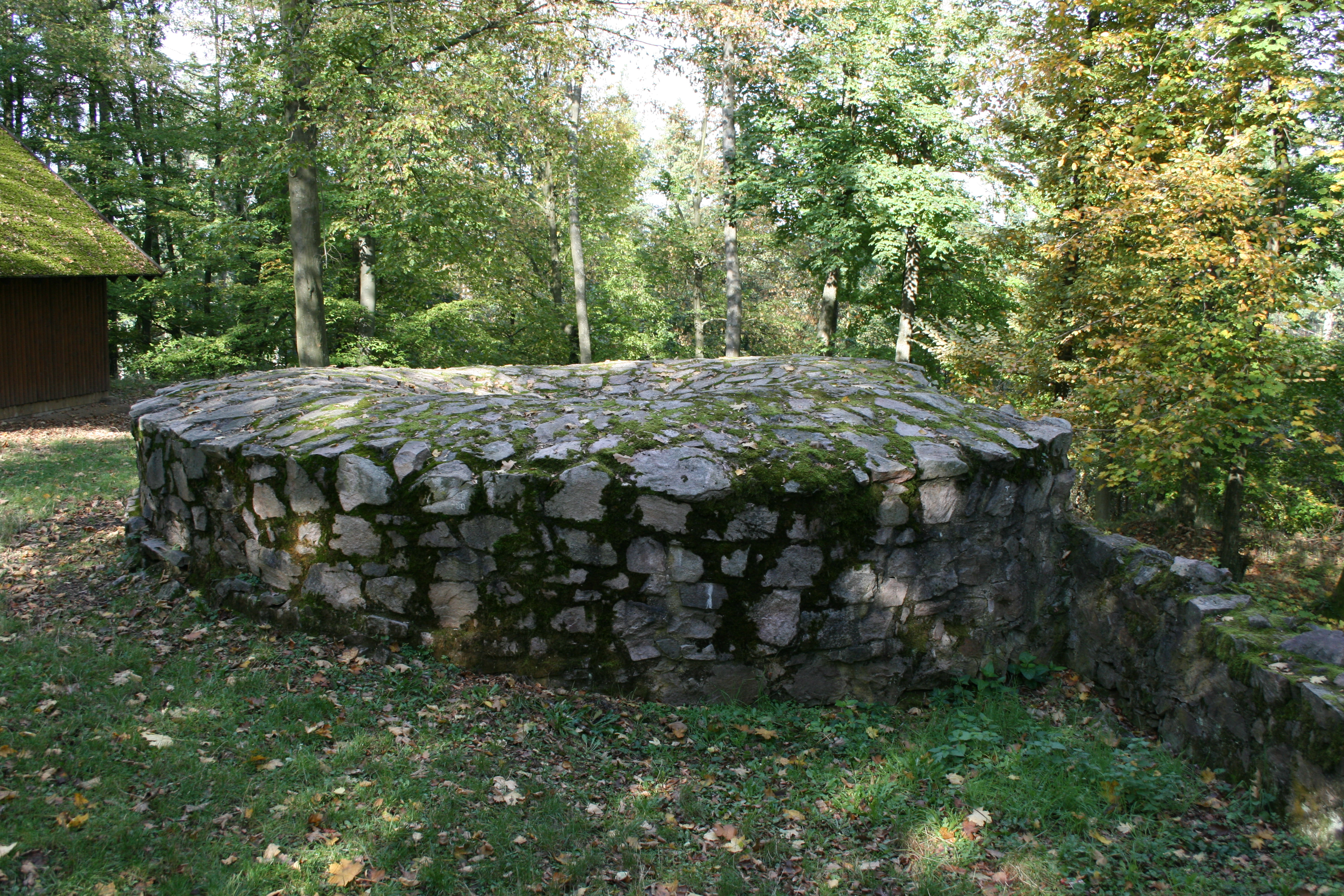 Burgruine Schnellerts im Odenwald. Ansicht des Turmstumpfes von Süden.